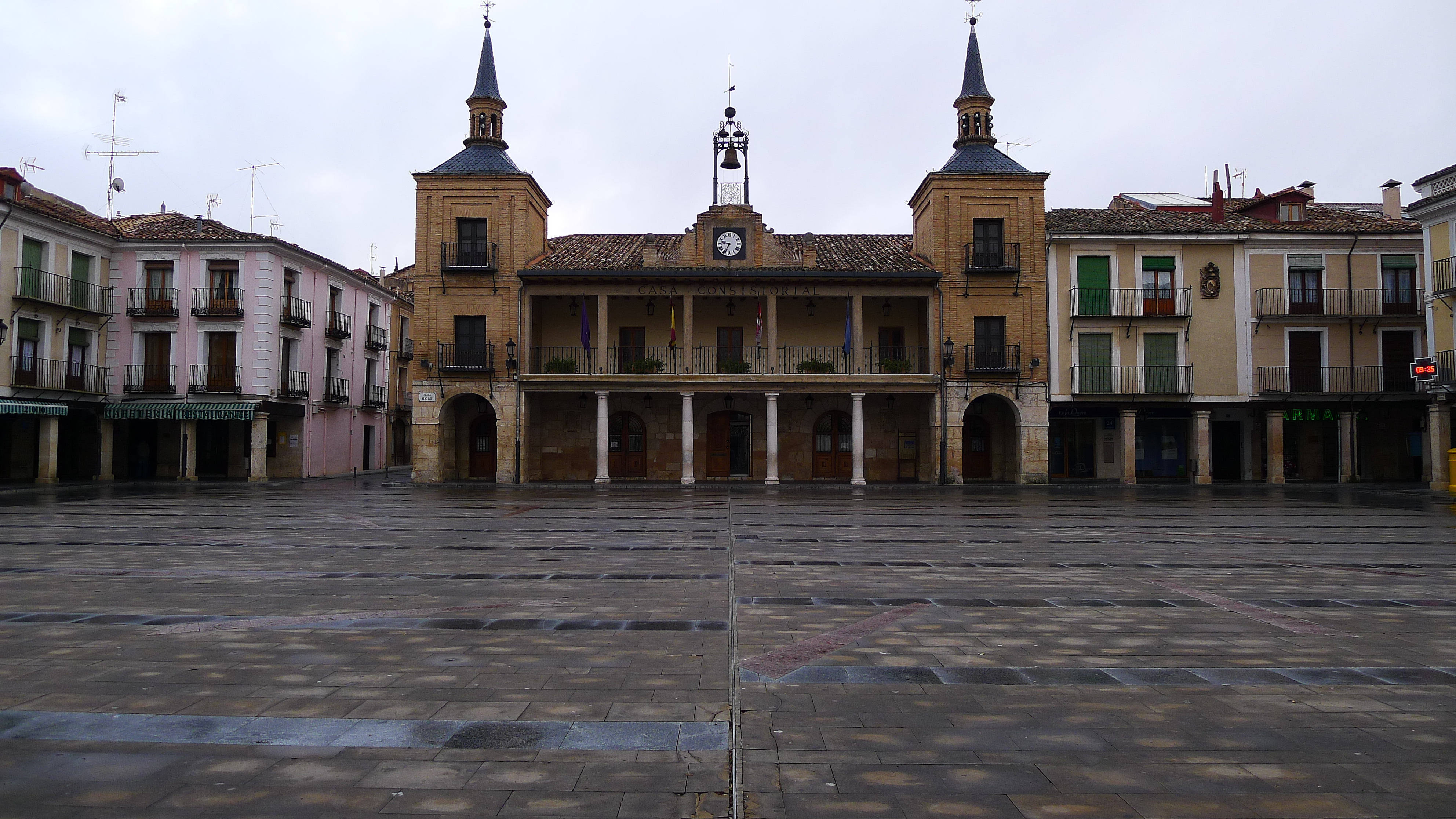 El arquitecto de la ciudad, Ángel Vicente Ubón, ultima la construcción de la Casa Consistorial y el urbanismo de la Plaza Mayor. Junto con el antiguo Hospital de San Agustín, ofrecen a El Burgo de Osma una importante muestra del neoclasicismo.